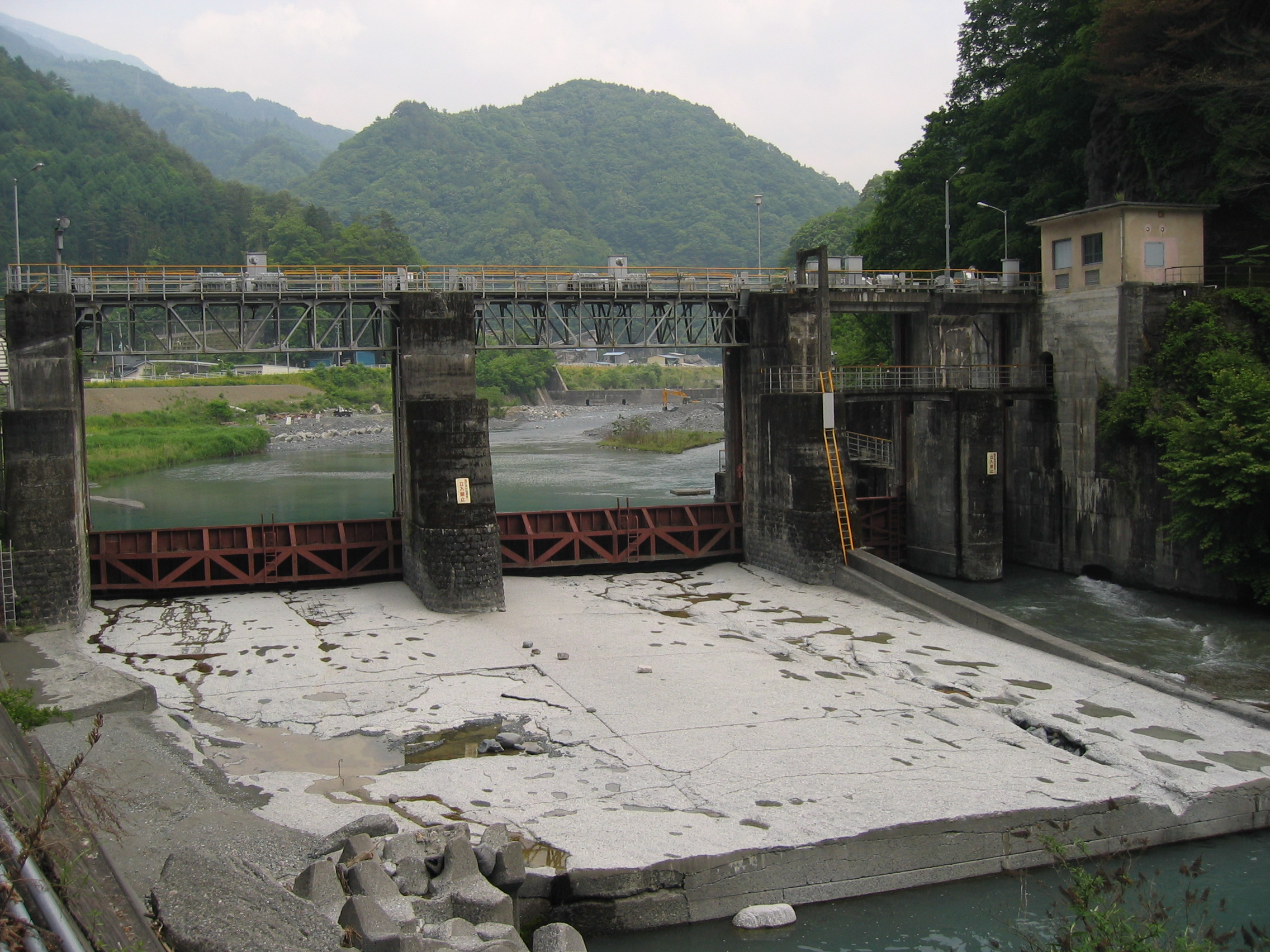 Ikuta dam (生田ダム) is a dam in Japan.